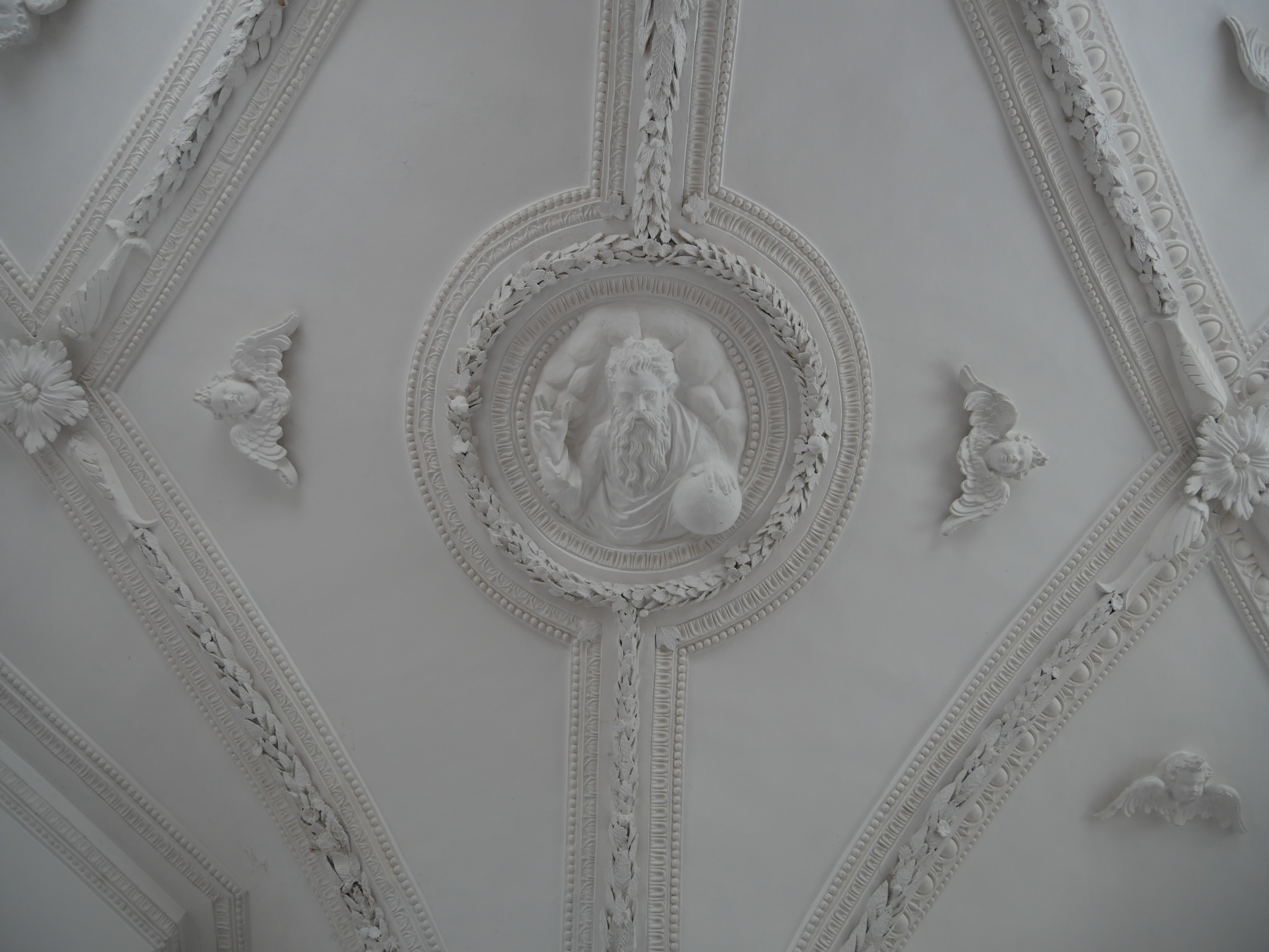 Kühbach, Ortsteil Paar, St. Lorenz und St. Stephan. Deckenstuck in der Sakristei